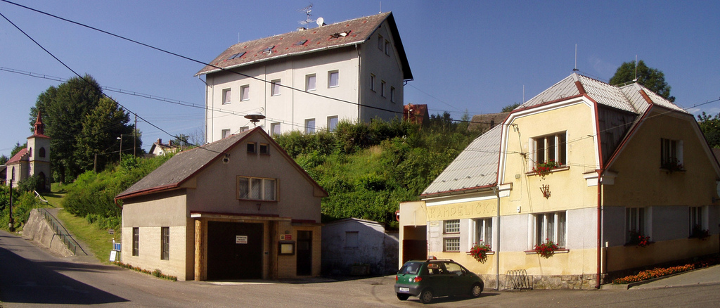 Kaple svatého Václava, hasičská zbrojnice (dole uprostřed) a obecní úřad (vpravo)